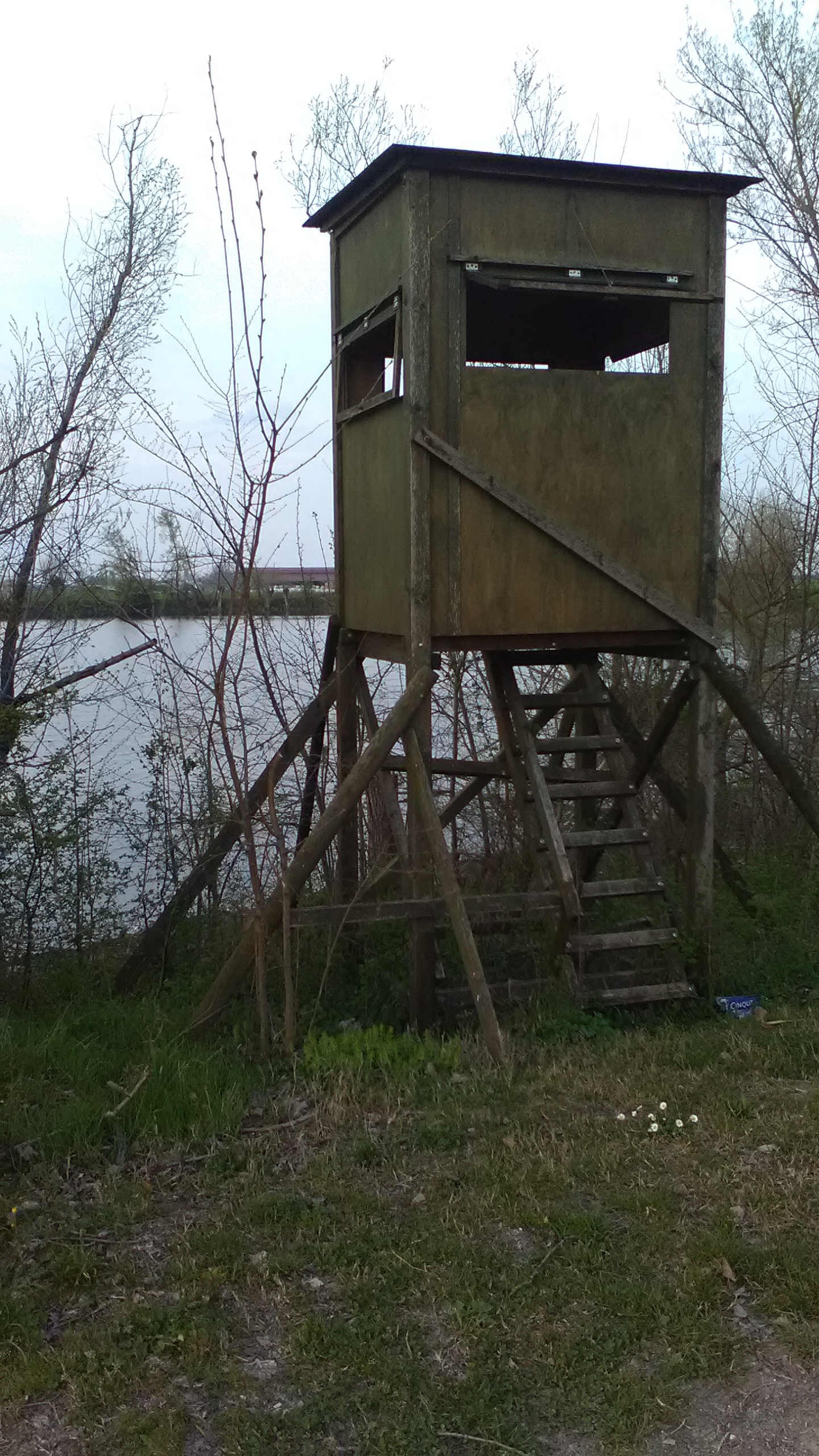 Capanno d'osservazione sul Gorgo Bianco a Trecenta (Rovigo)